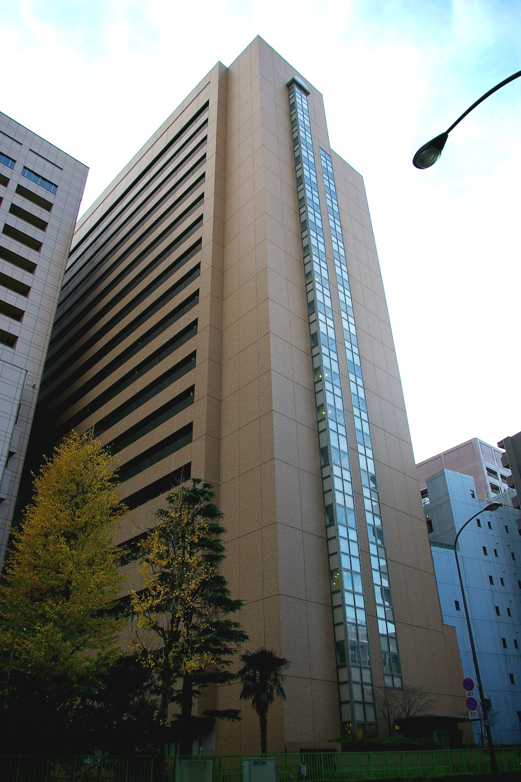 東京医科歯科大学